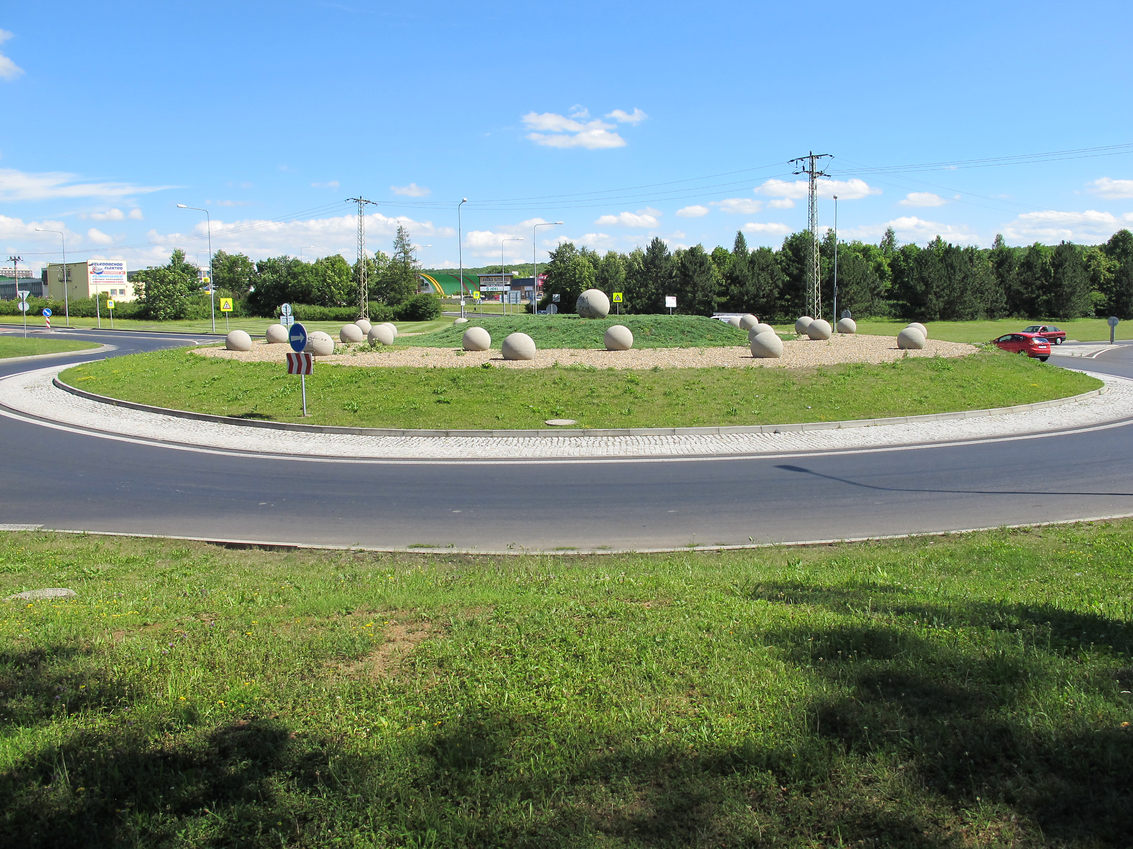 Kruhový objezd na obchvatu města v ulicích Budovatelů, Pražská (I/27), Obchodní a Čepirožská